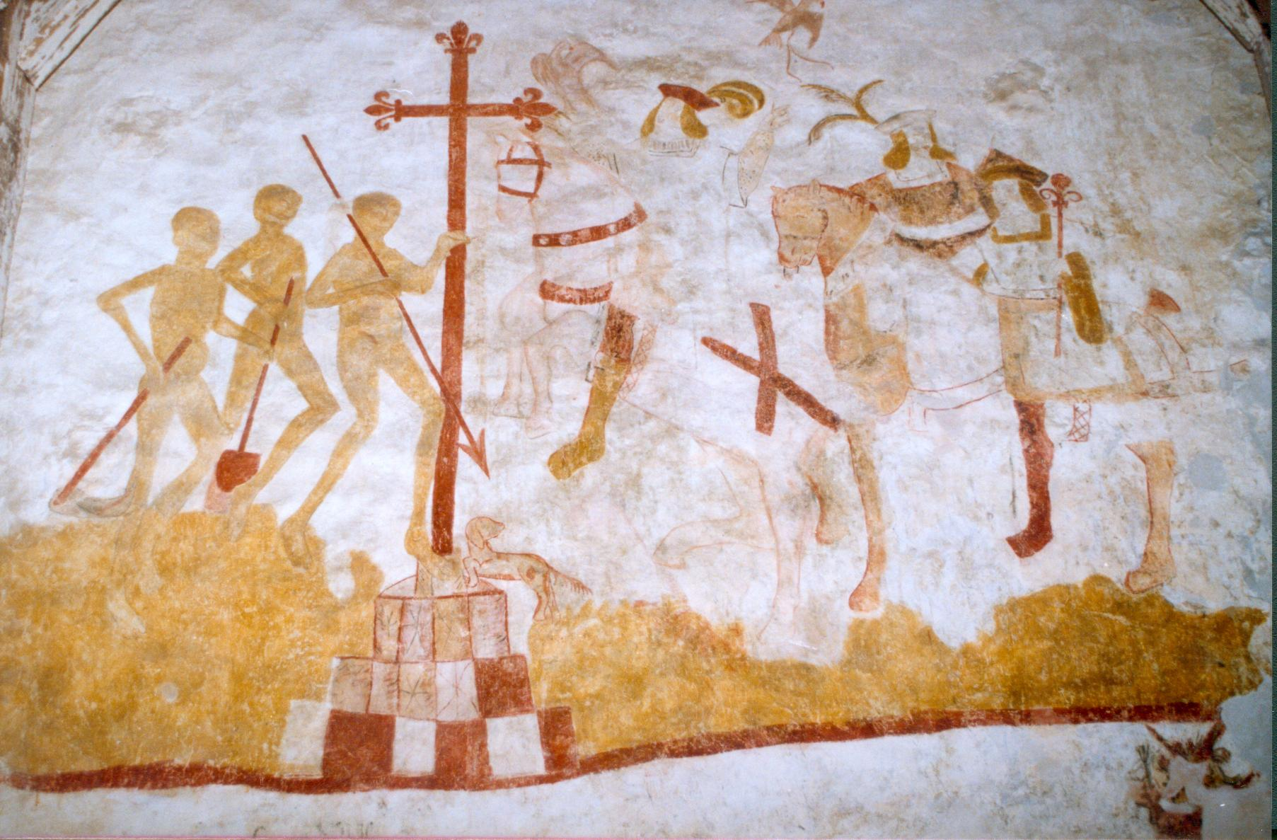 Église de Lancôme (Loir-et-Cher, France) - Peintures murales - Le dict des trois morts et des trois vifs. Cette peinture rappelait aux gens que la mort était peut-être plus proche qu'ils ne le pensaient et que personne, même puissant et riche n'y échapperait : trois jeunes cavaliers vont à la chasse avec leurs faucons ; dans un cimetière, ils sont arrêtés par trois morts, qui leur rappellent la brièveté de la vie et l'importance du salut de leur âme.